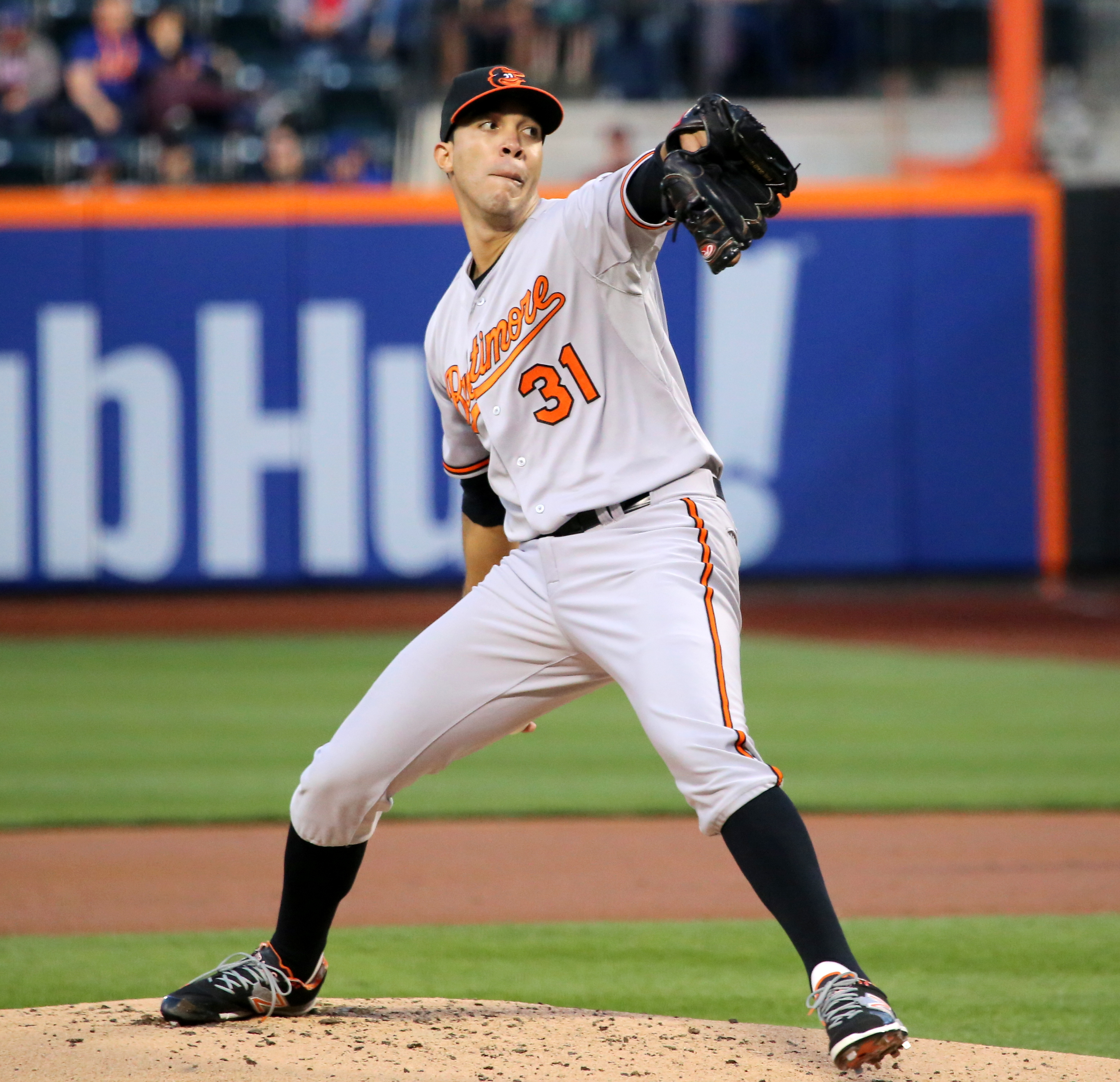 Ubaldo Jiménez